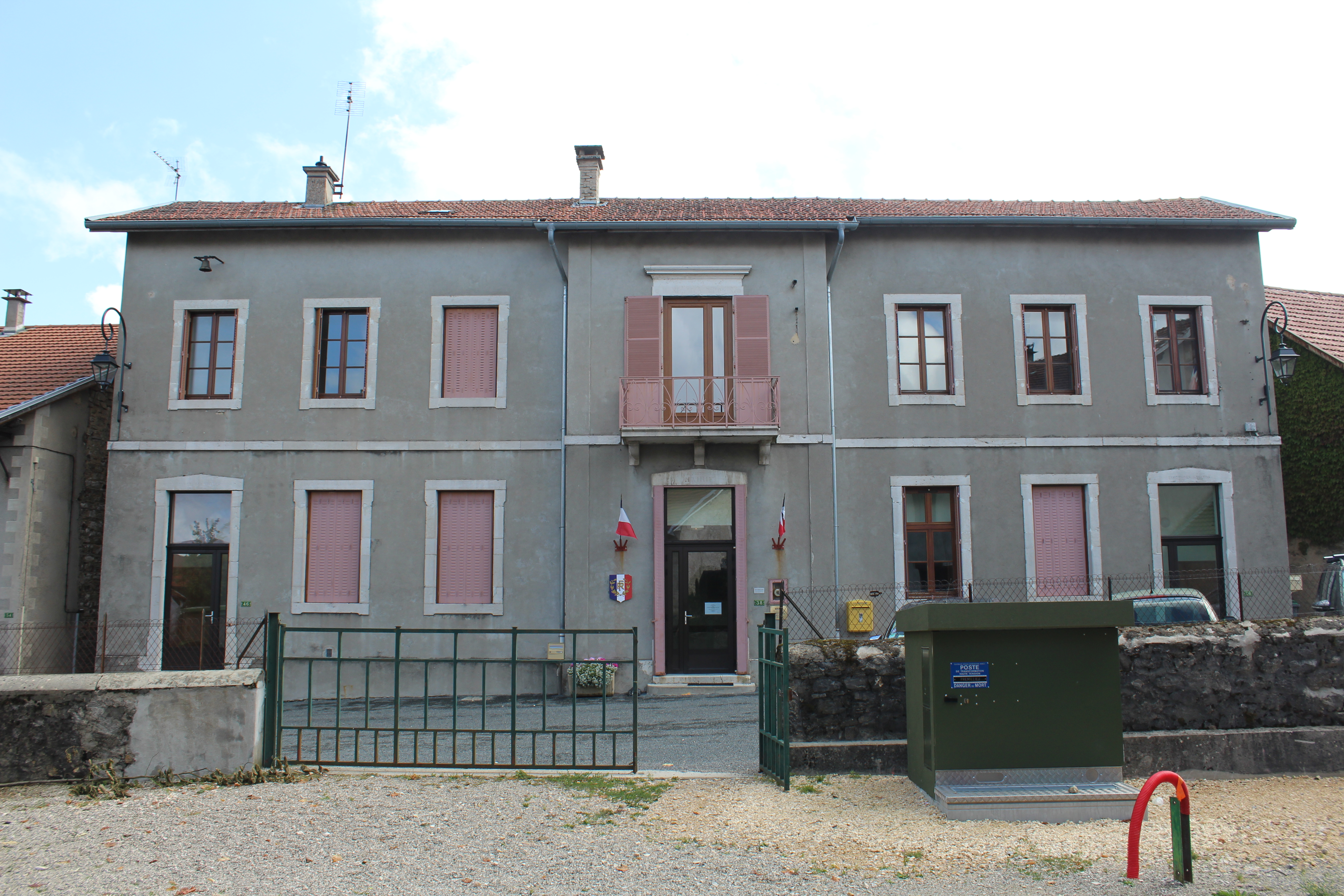 Mairie de Prémillieu.